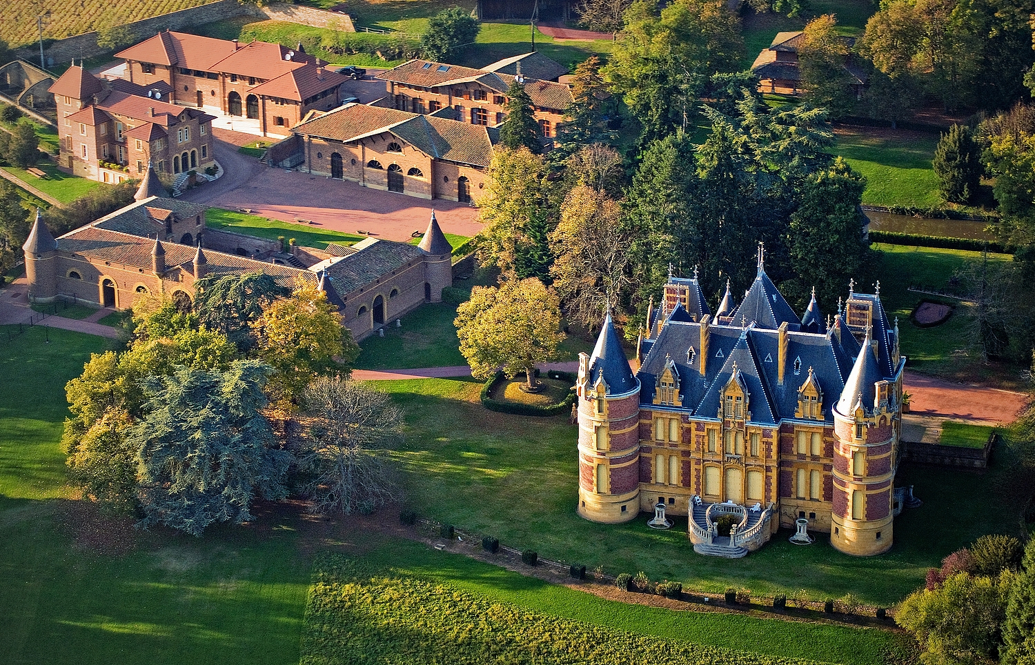 Château de la Flachère, (ClasséInscrit, 19811981) .